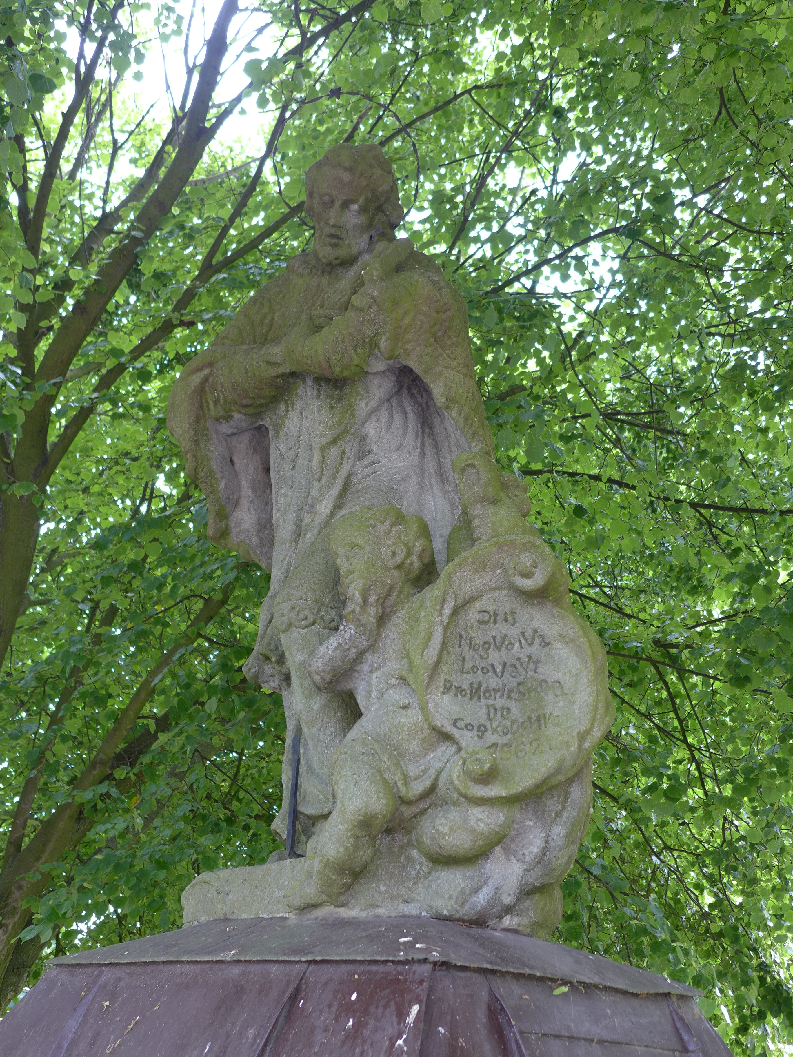 Socha svatého Jana Nepomuckého, Meziříčko (okres Žďár nad Sázavou).